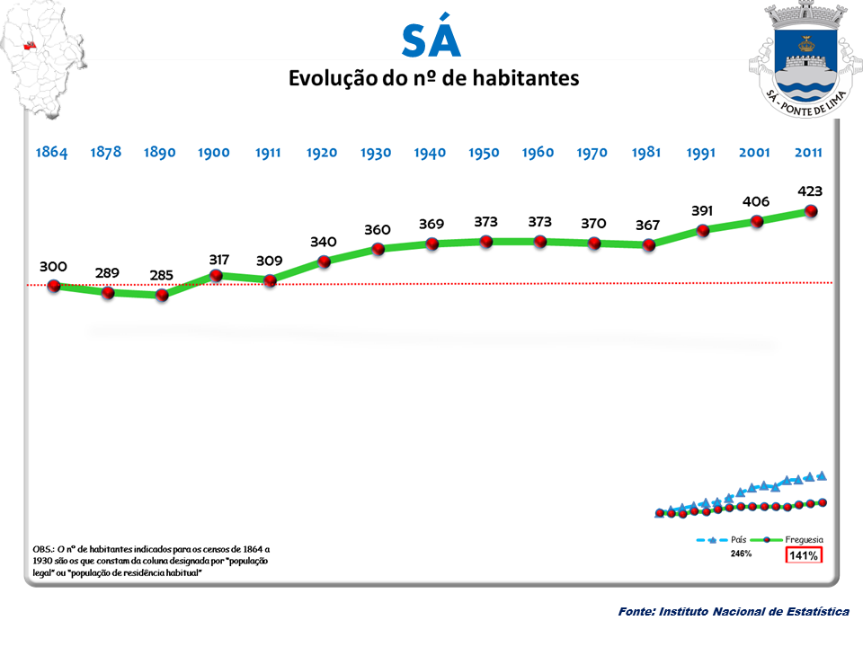 Censos 1864/2011